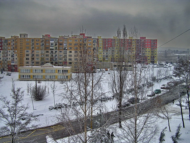 Európska trieda v zime. European Ave. in winter.